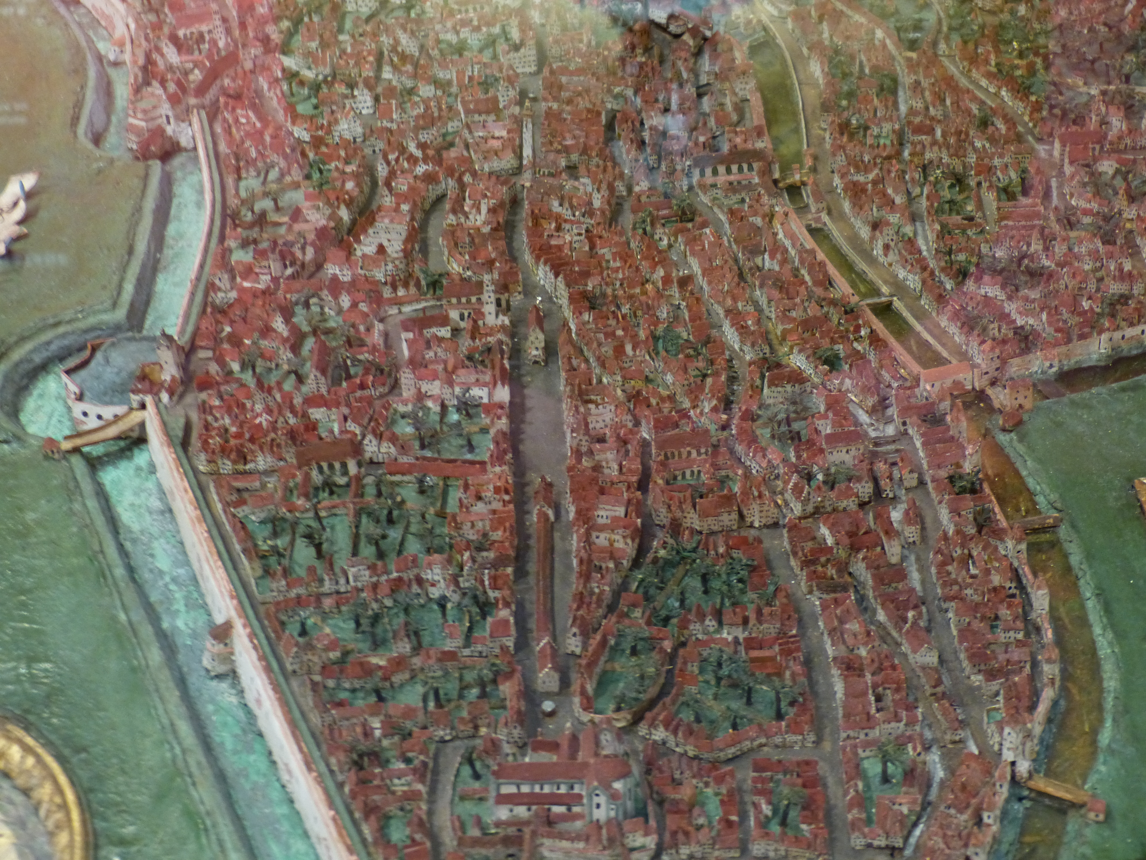 Augsburg, Maximilianmuseum